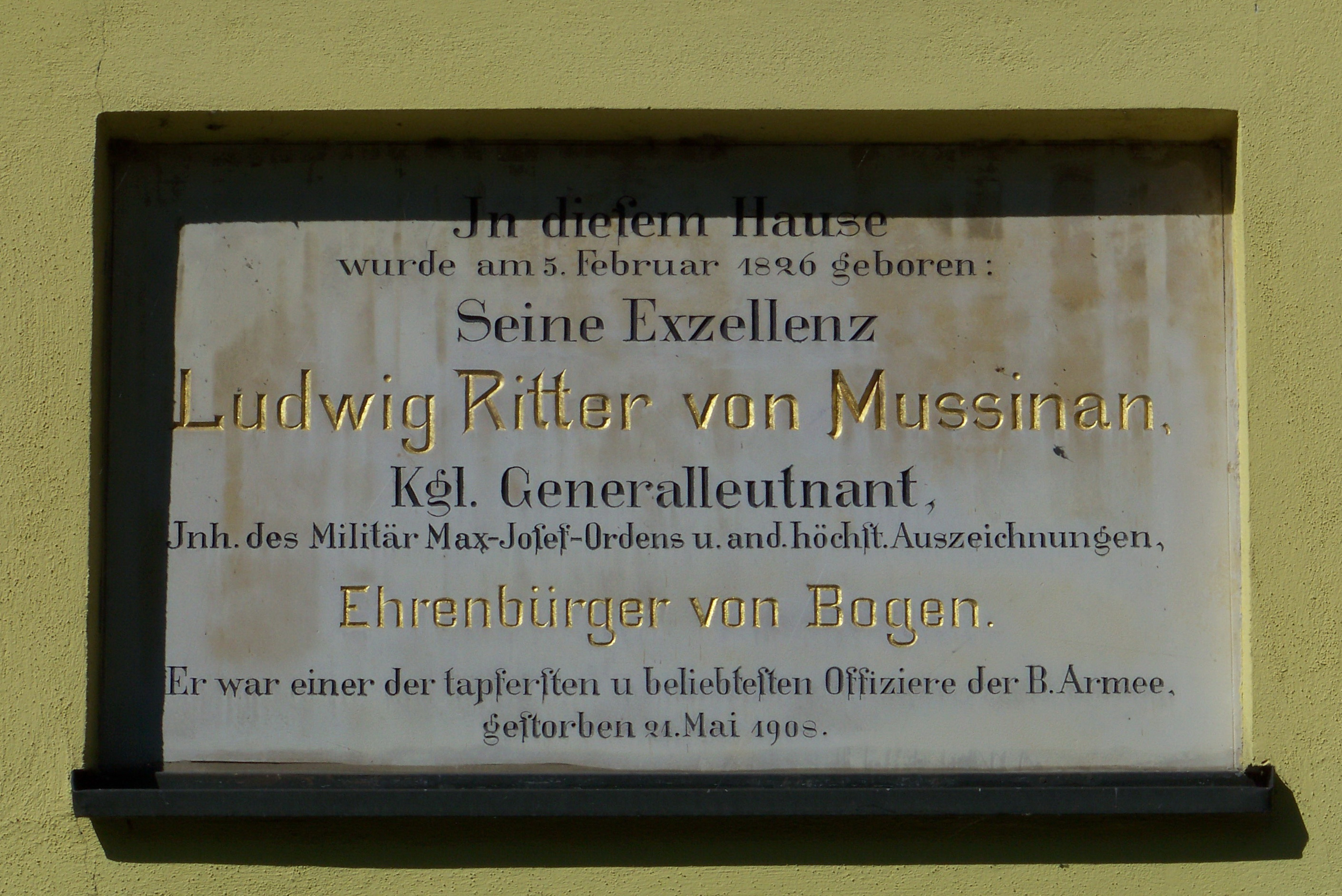 Bogen, Mussinanstraße 7. Gedenktafel am Mussinanhaus.